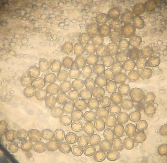 Eipaket innerhalb einer Proglottide eines Gurkenkernbandwurmes Autor: Kalumet, selbst erstellt, 03.10.2005